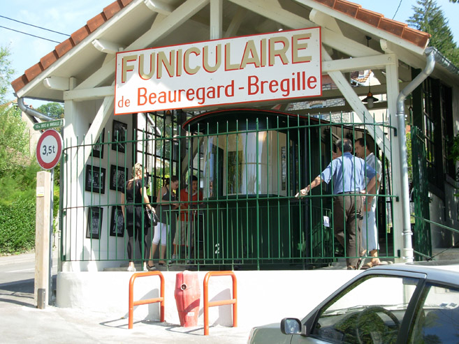 La gare basse en septembre 2007